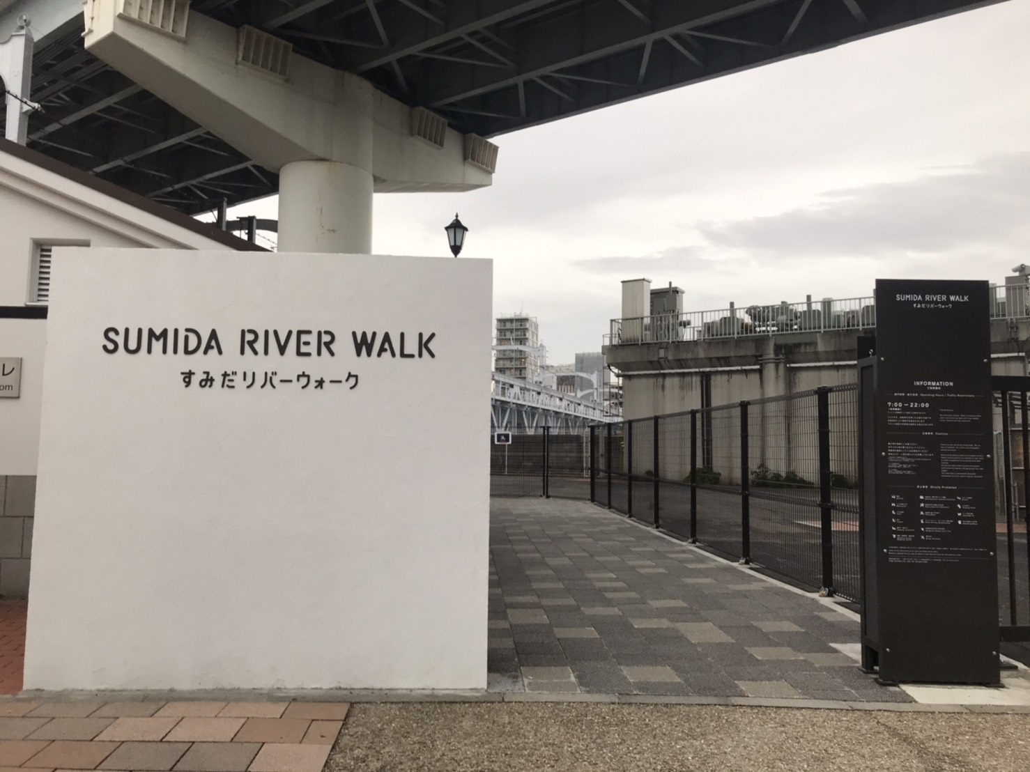 すみだリバーウォーク (Sumida river walk)